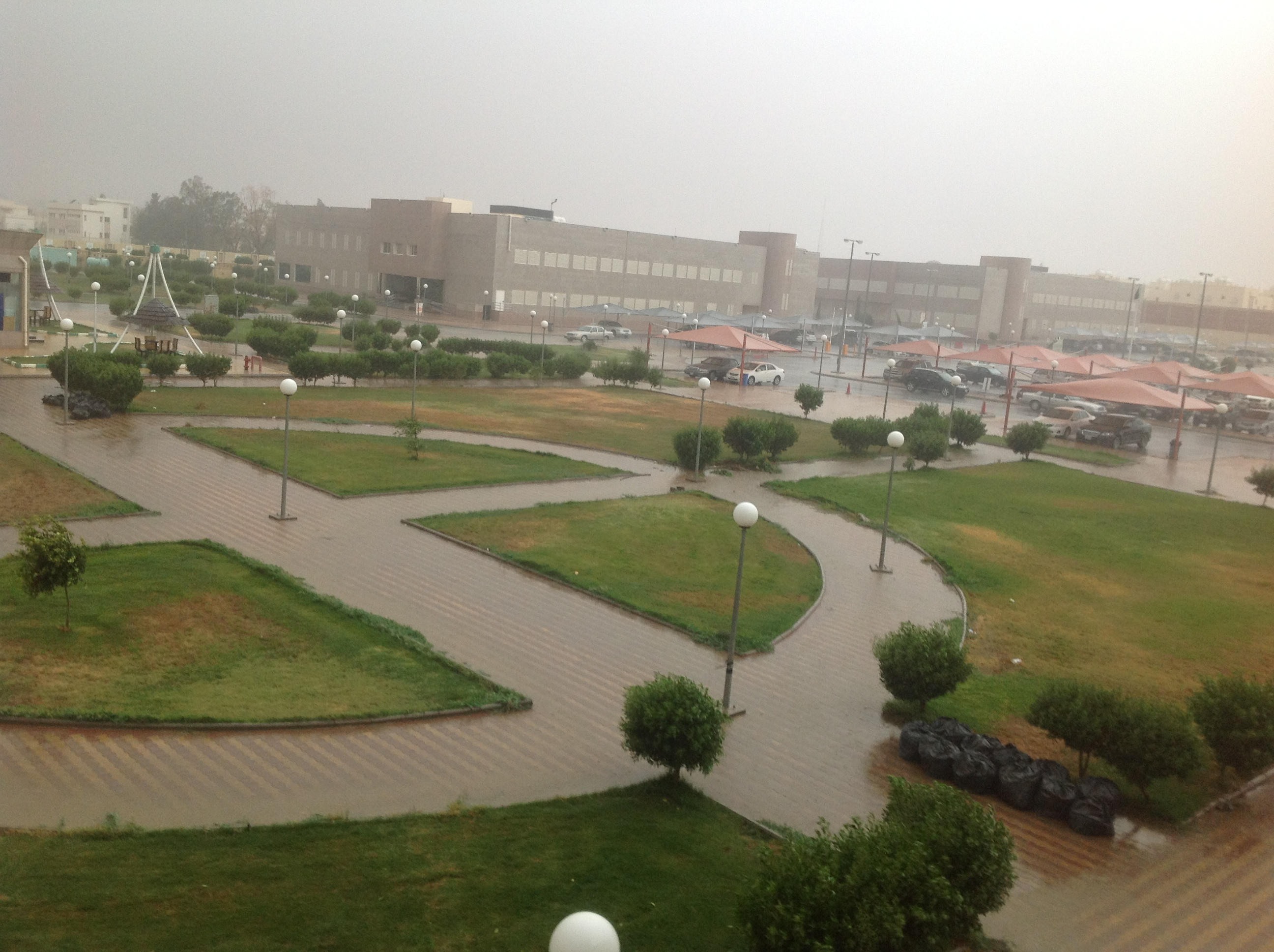 صورة ملتقطة في كلية الطب بجامعة الطائف وقت هطول الأمطار ويتضح فيها مبنى إدارة الكلية.